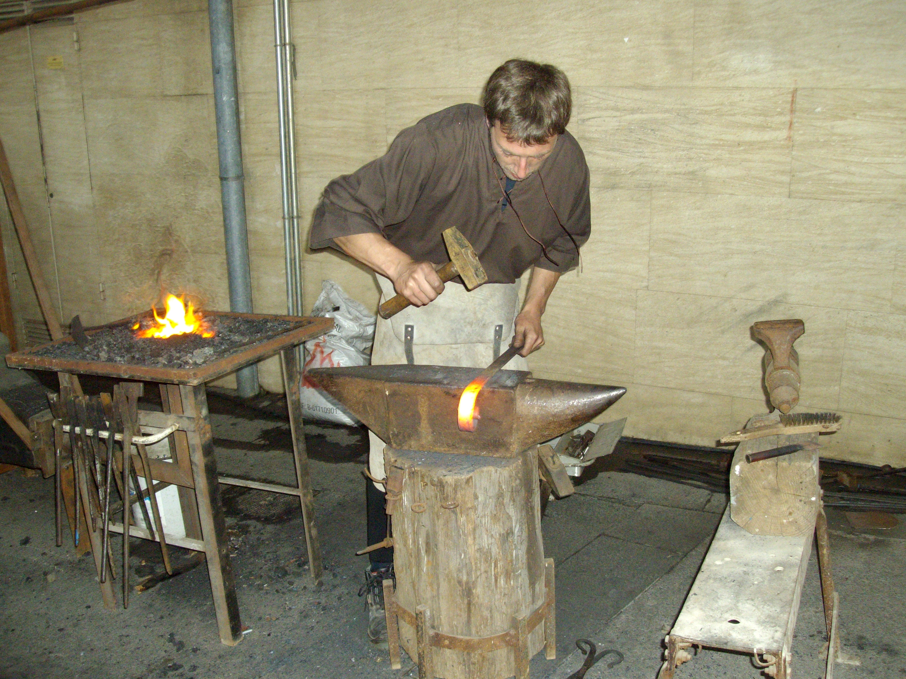 Feria medieval Medievàlia, celebrada los días 17, 18 y 19 de mayo de 2013 alrededor de la plaza del Mercado de Sabadell (Barcelona).